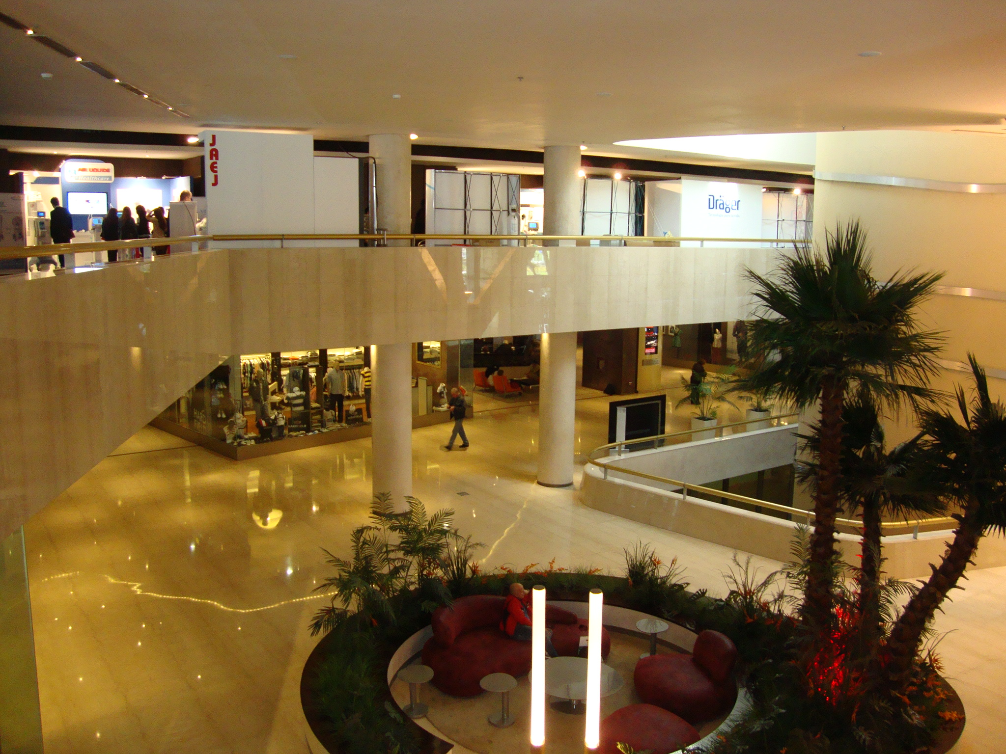 Hall de acceso al hotel y centro de convenciones City Center Rosario, inaugurado en 2010.